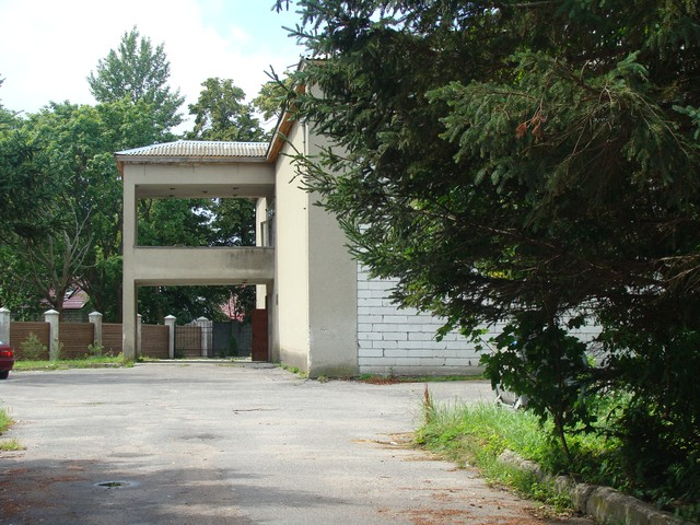 Здание ДК п. Моховое. Зеленоградский муниципальный район Калининградской области.